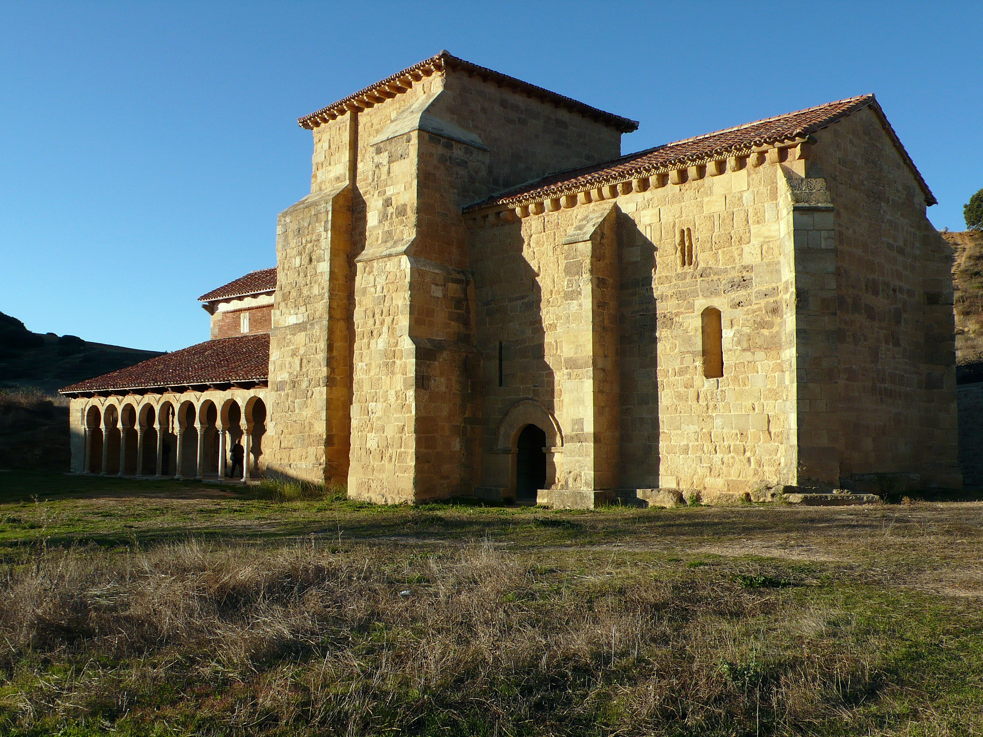 Alfonso III el Magno favorece la construcción de un nuevo monasterio sobre el visigodo de San Miguel Arcángel. Muestra la herencia visigoda, el arte prerrománico asturiano y los elementos mozárabes de abad cordobés Alfonso.